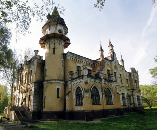 Будинок Григорія Глібова (тепер НДІ сільськогосподарської мікробіології), м. Чернігів, травень 2010 року